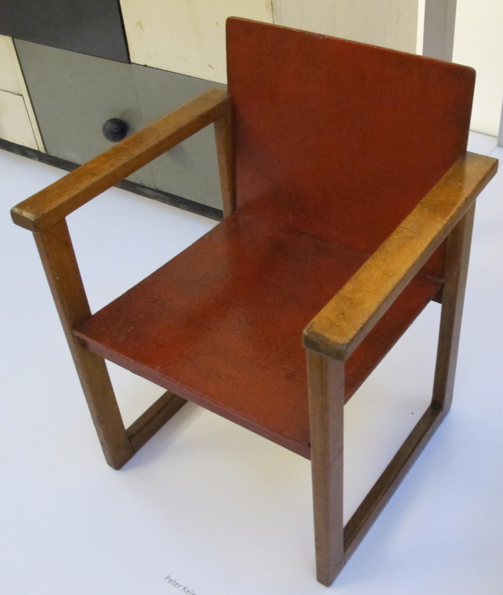 Katt both, sedia da bambini, 1927